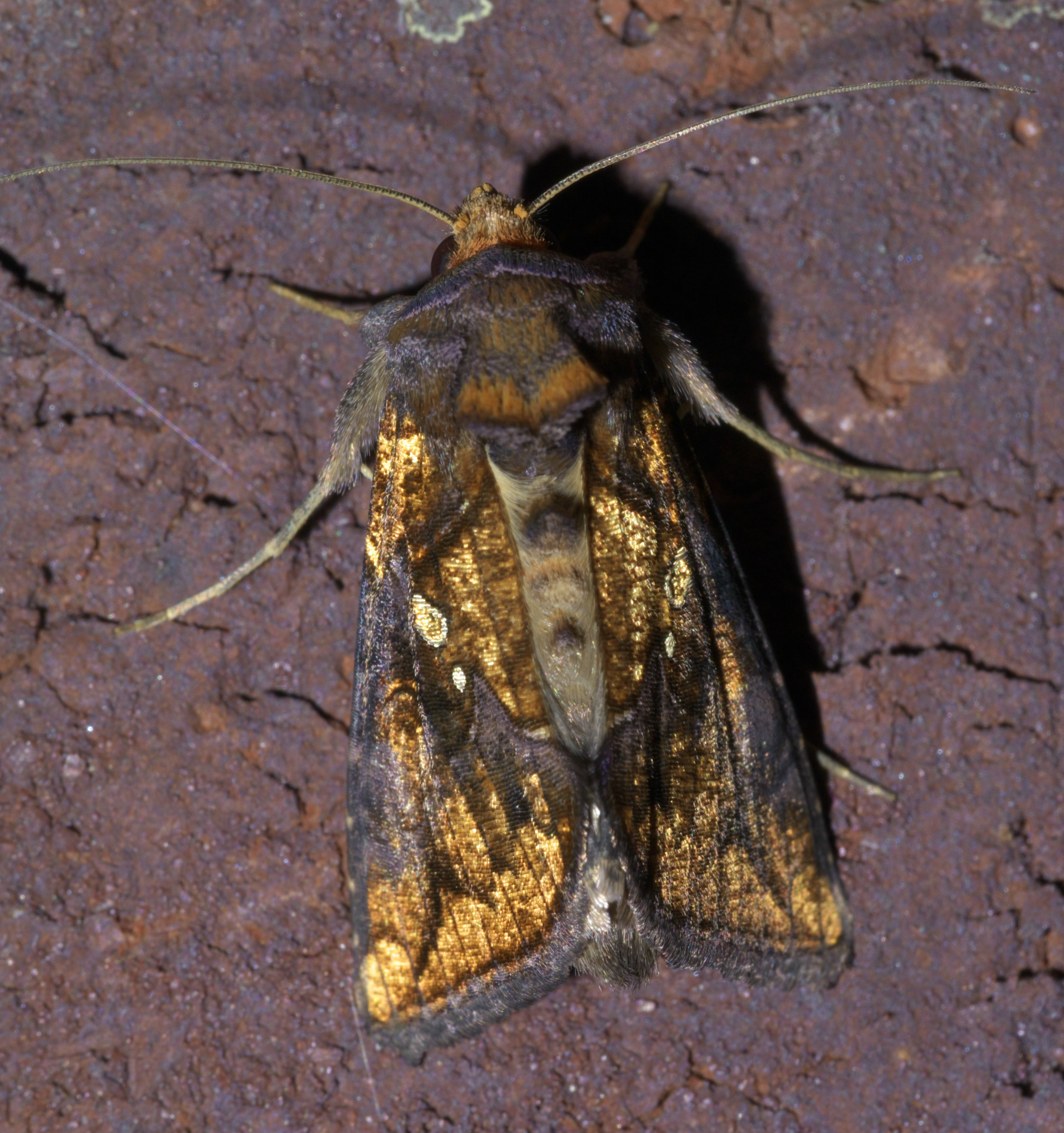 Argyrogramma verruca, golden looper, ID Confidence: 88